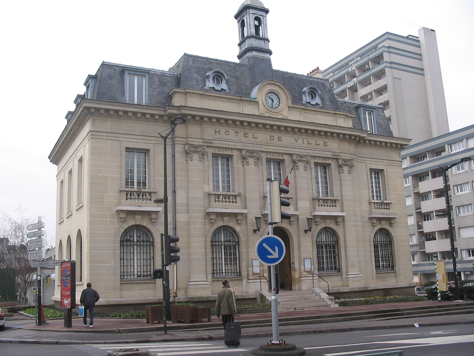 Mairie de l'Ile-Saint-Denis (93). Je suis l'auteur du cliché pris au printemps 2005 Town hall of l'Ile-Saint-Denis (Seine-Saint-Denis, France), I have taken this picture myself Licensing Catégorie:L'Île-Saint-Denis